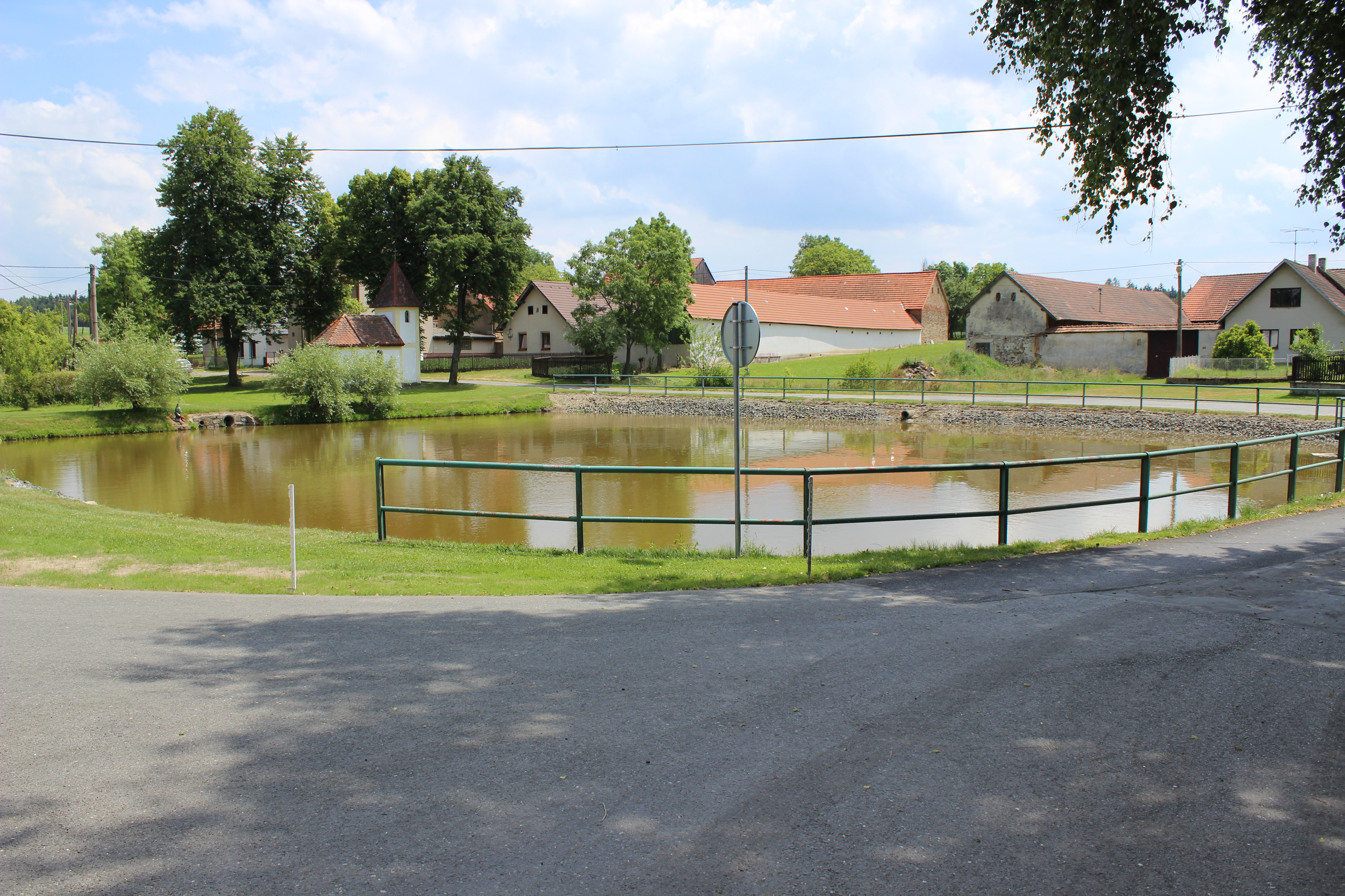 Vodní nádrž na návsi ve Lhotě Bubeneč.